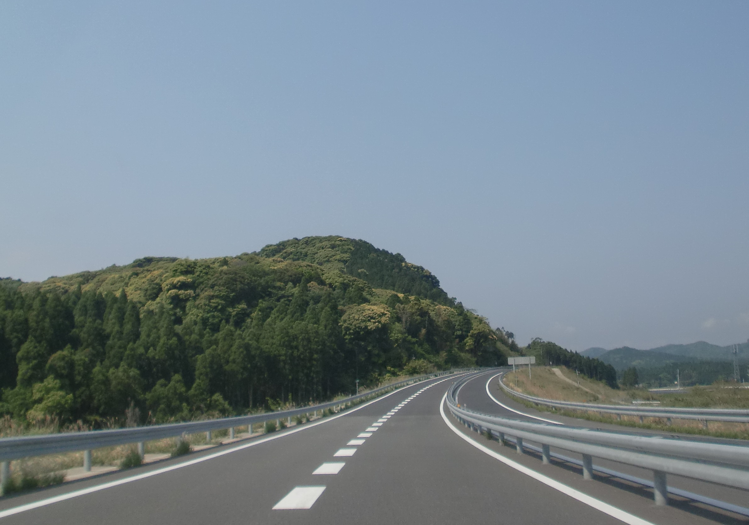 南薩縦貫道の本線（南九州川辺ダムIC-南九州神殿IC、下り）。